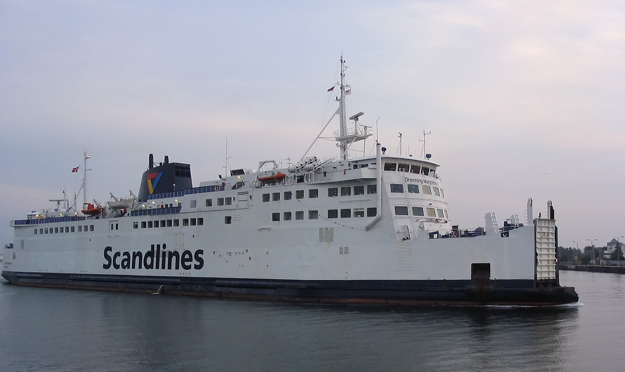 Schiffsname: FS "Dronning Margrethe II" im Hafen von Rostock Indienststellung: de:1973 Heimathafen: Rödbyhavn Passagiere: 800 LÃ¤nge/Breite: 144,56 m / 17,20 m Geschwindigkeit: 15,5 Knoten seit 1998 Linie: Rostock - Gedser